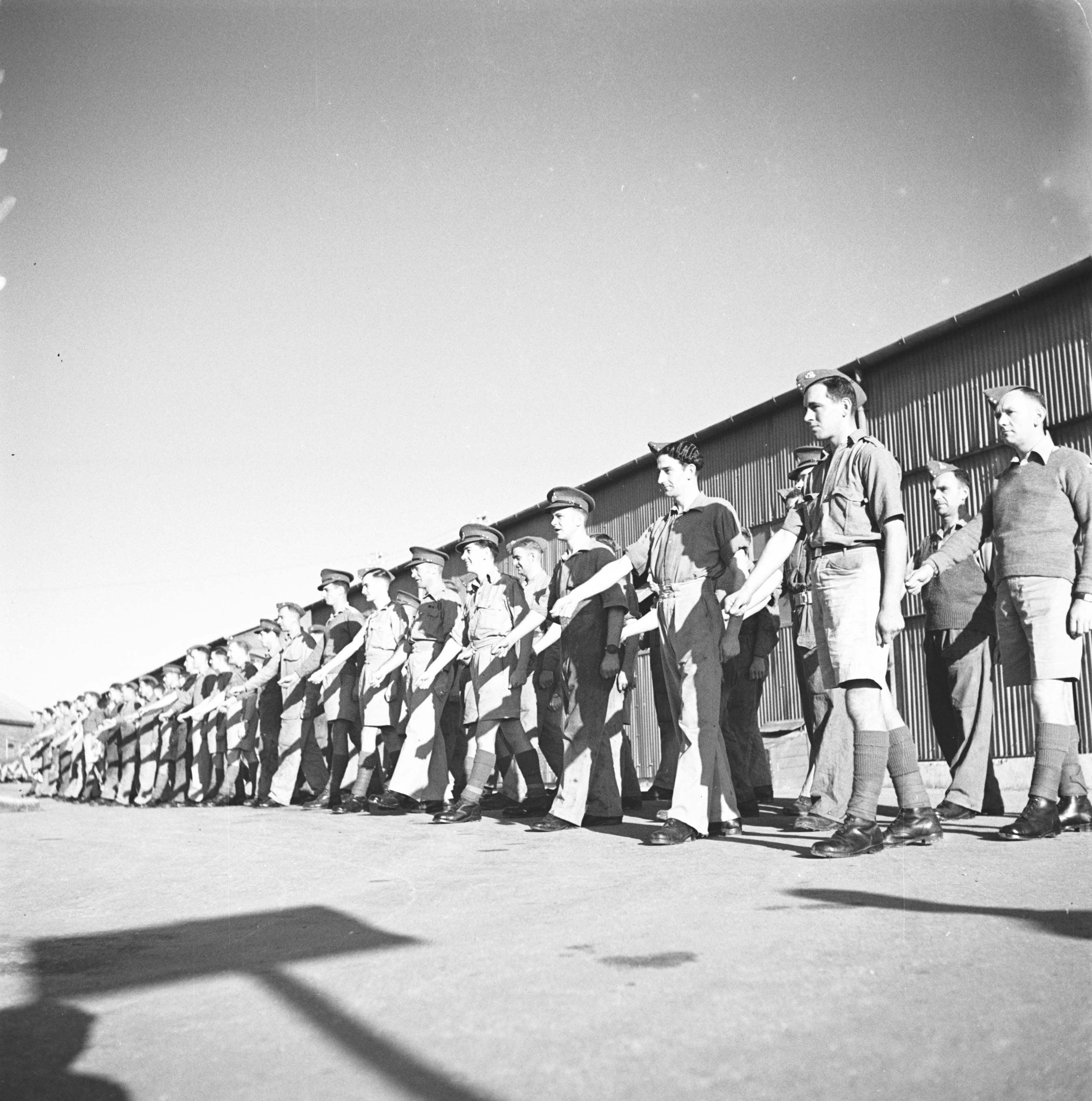 אוסף צילומים של הצלם זולטן קלוגר טווח מספרי התשלילים 16431 - 16466: RAOC (Royal Army Ordnance Corps)